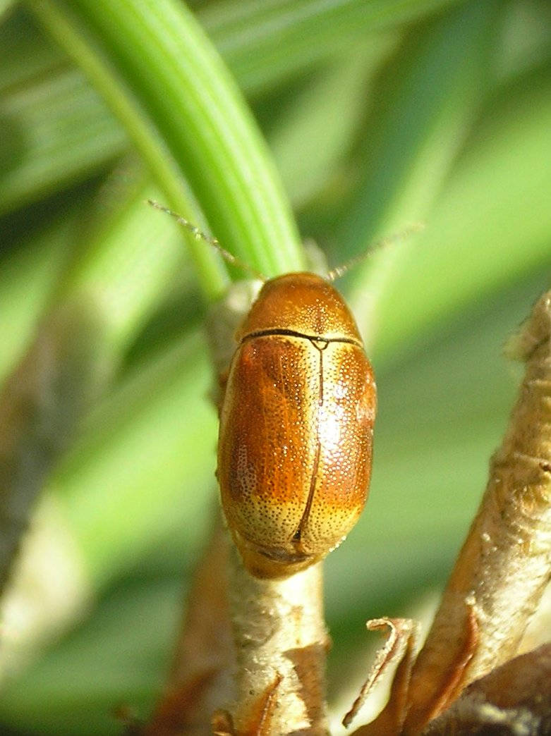 Cryptocephalus pini, zmróżka sosnowa, Polska